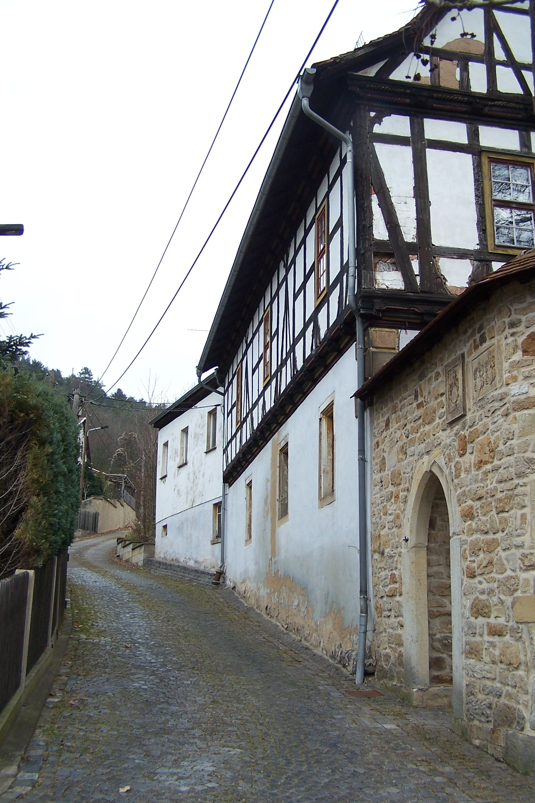 Der Malittenburgweg führt an der Westfront vom Fischbacher Schloss entlang zum Fischbacher Berg.